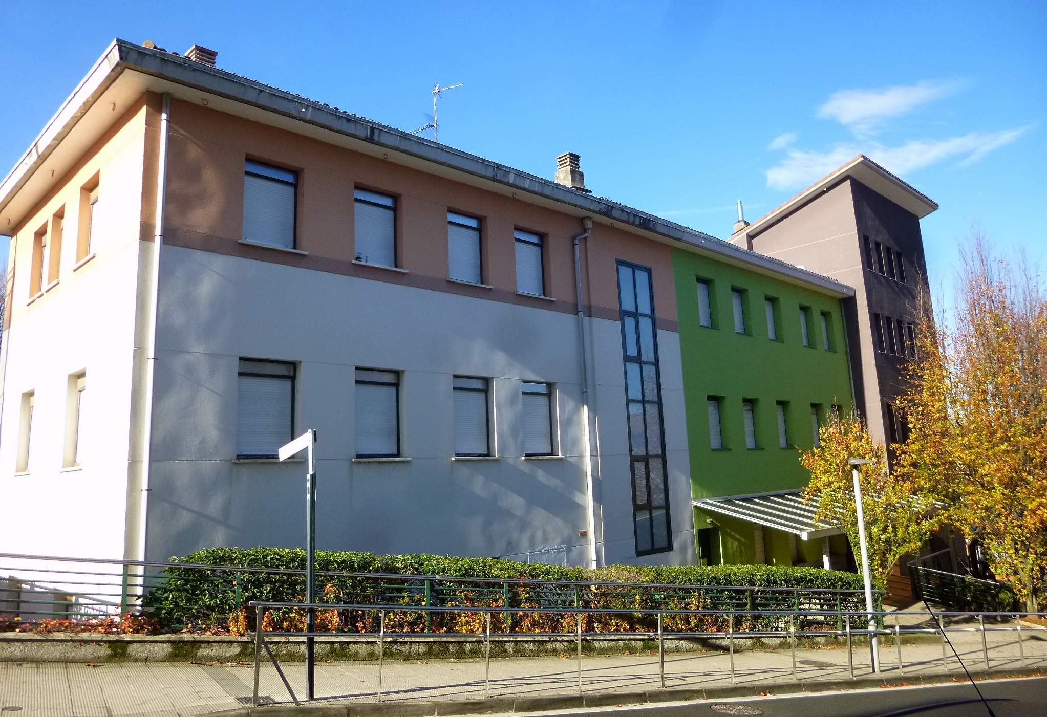 Astigarraga - Astigarragako Herri Eskola